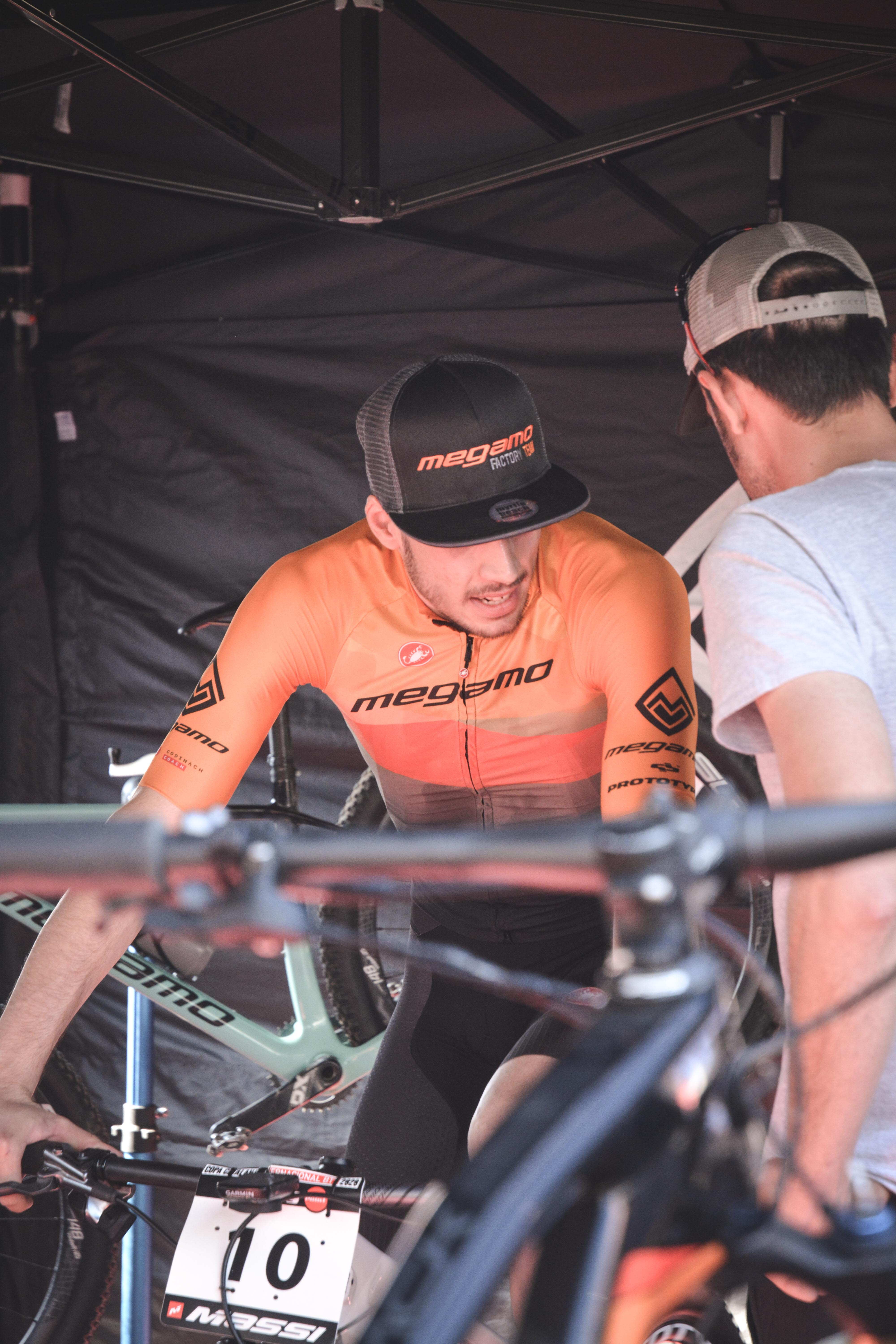 Jofre Cullell escalfant abans de la Copa Catalana Internacional de Banyoles nivell HorsClass.